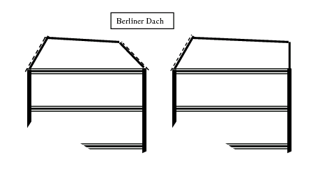 sketch of "Berliner Dach"